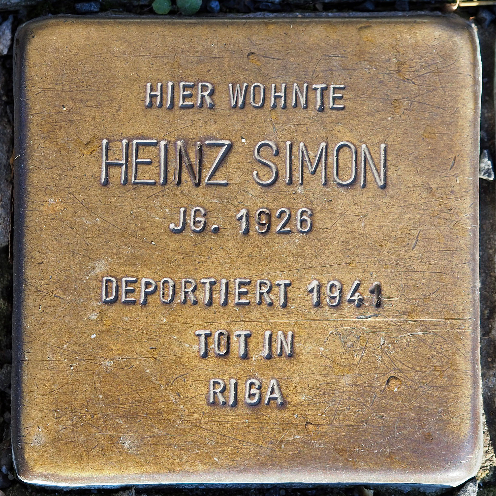 Stolpersteine MG: Simon, Heinz